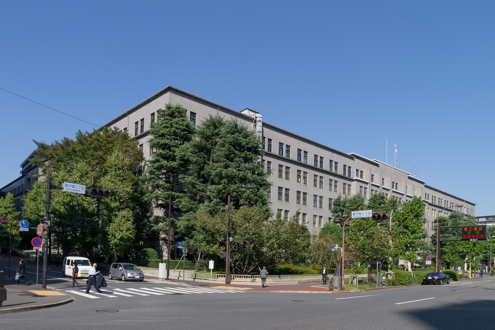 財務省、国税庁、東京都千代田区霞が関3-1-1。